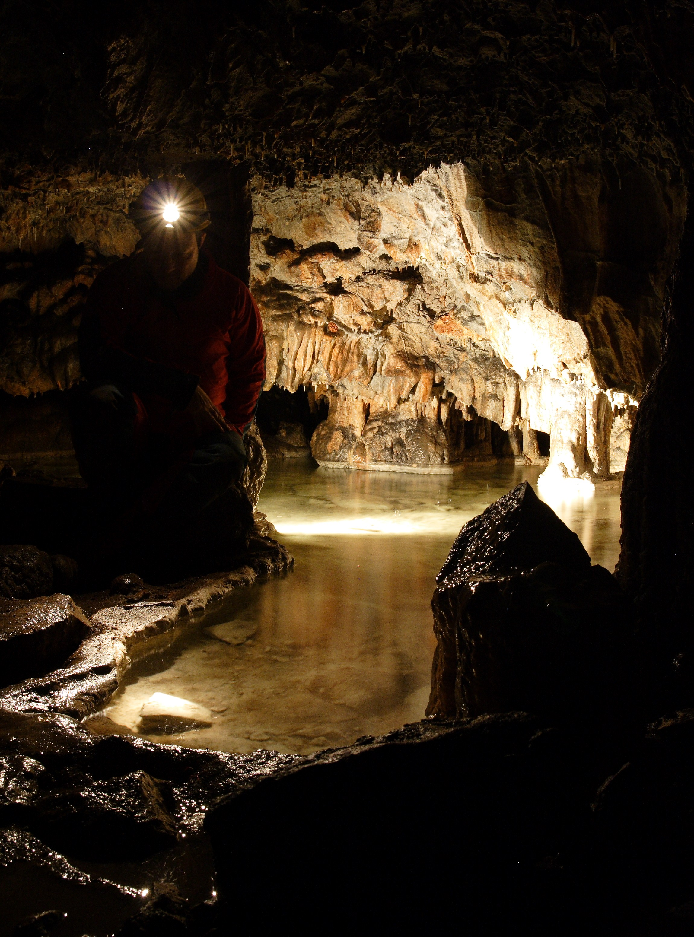 laghetto ramo superiore